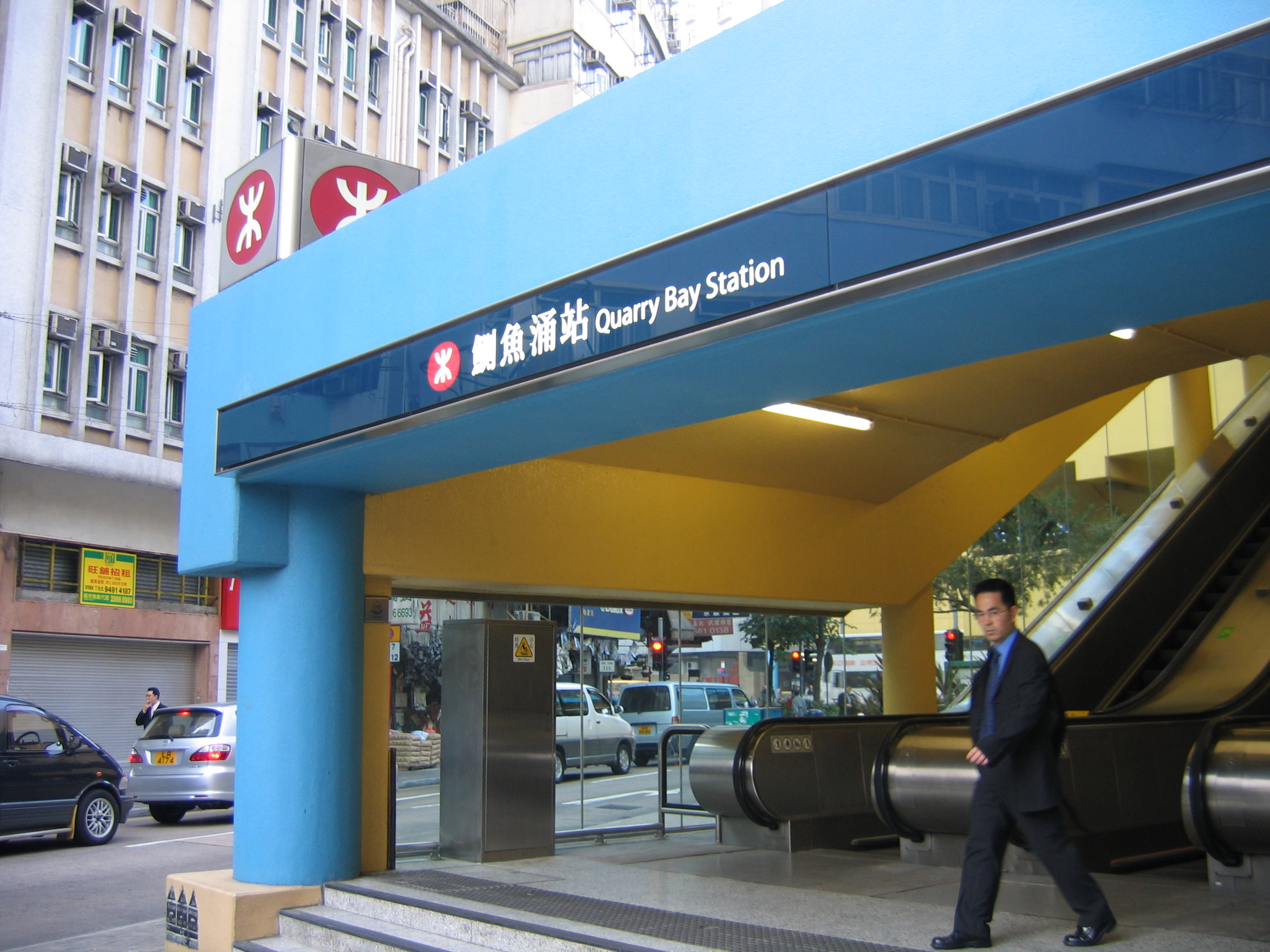 Exit B1, Quarry Bay MTR Station, Quarry Bay, Hong Kong.